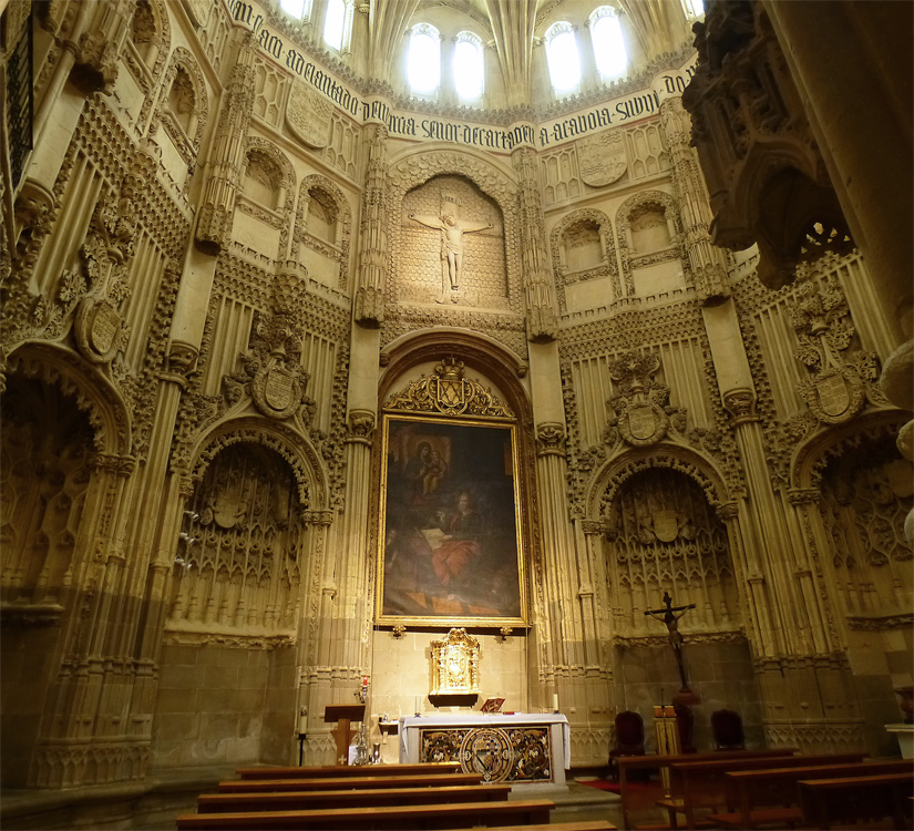 Capilla de los Vélez, Catedral de Murcia, Región de Murcia, España.